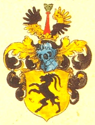 Wappen derer von Steinberg